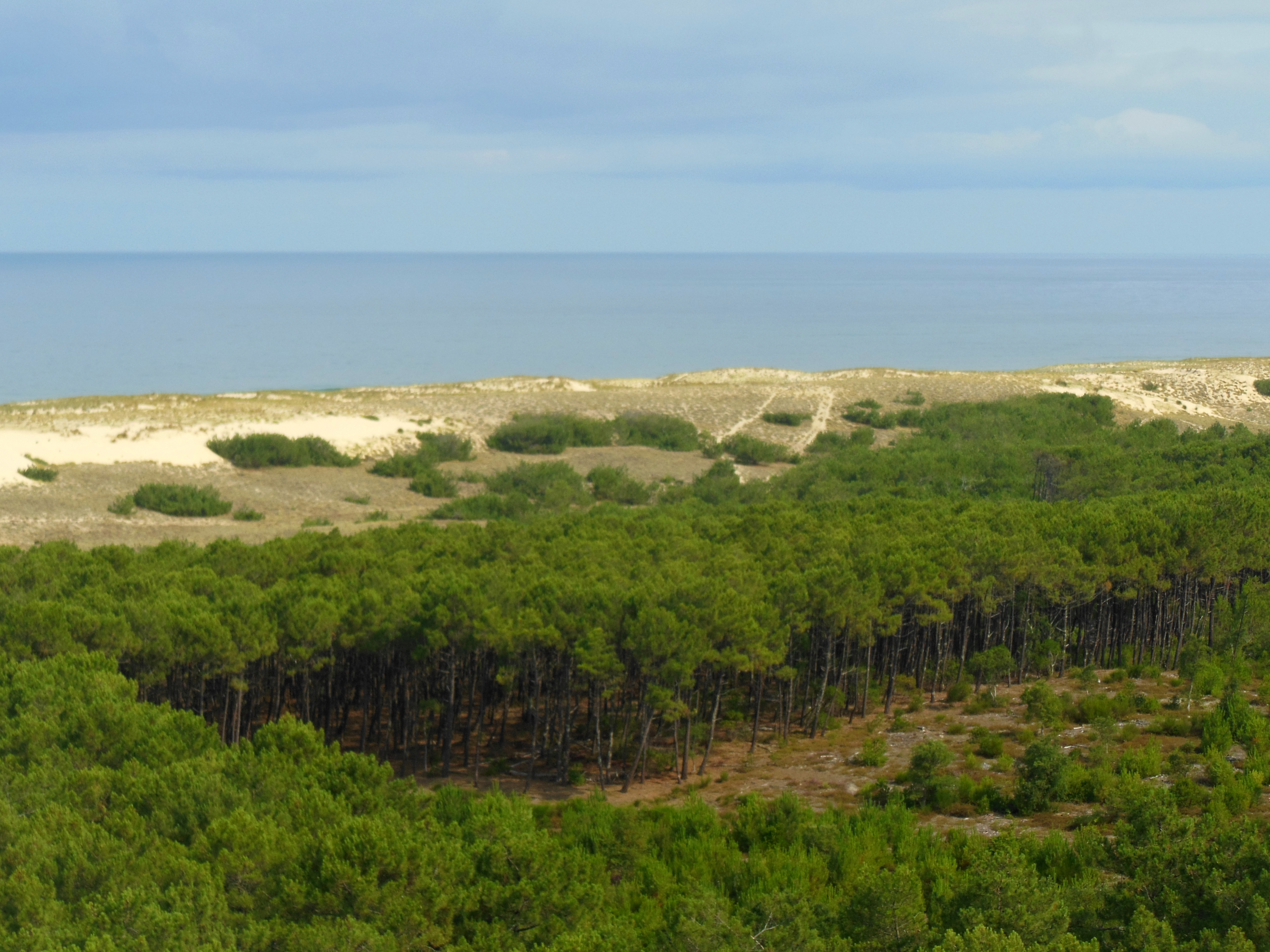 Contis, vue depuis le phare sur la lette, la dune et le Golfe de Gascogne